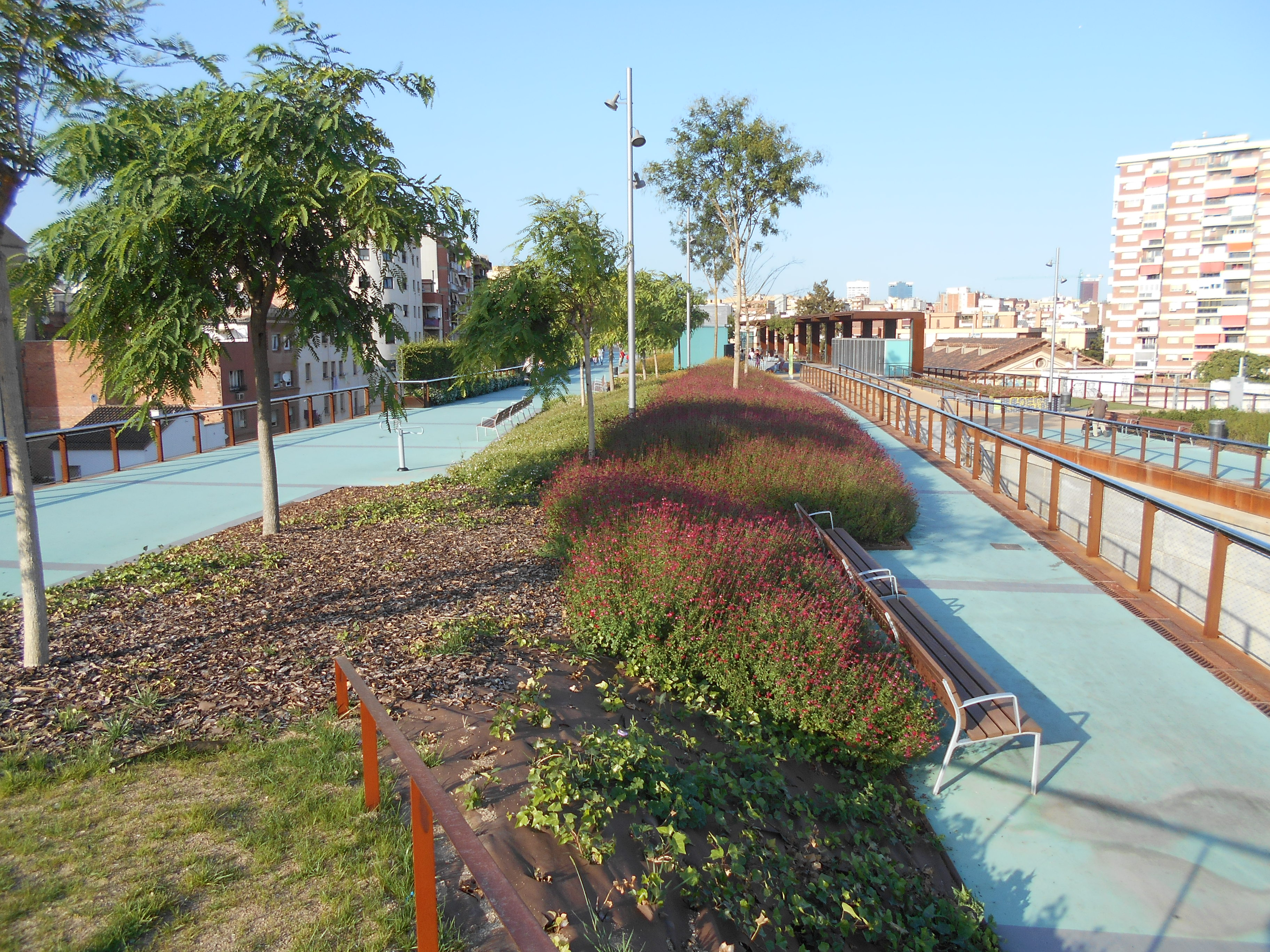 Jardines de la Rambla de Sants.